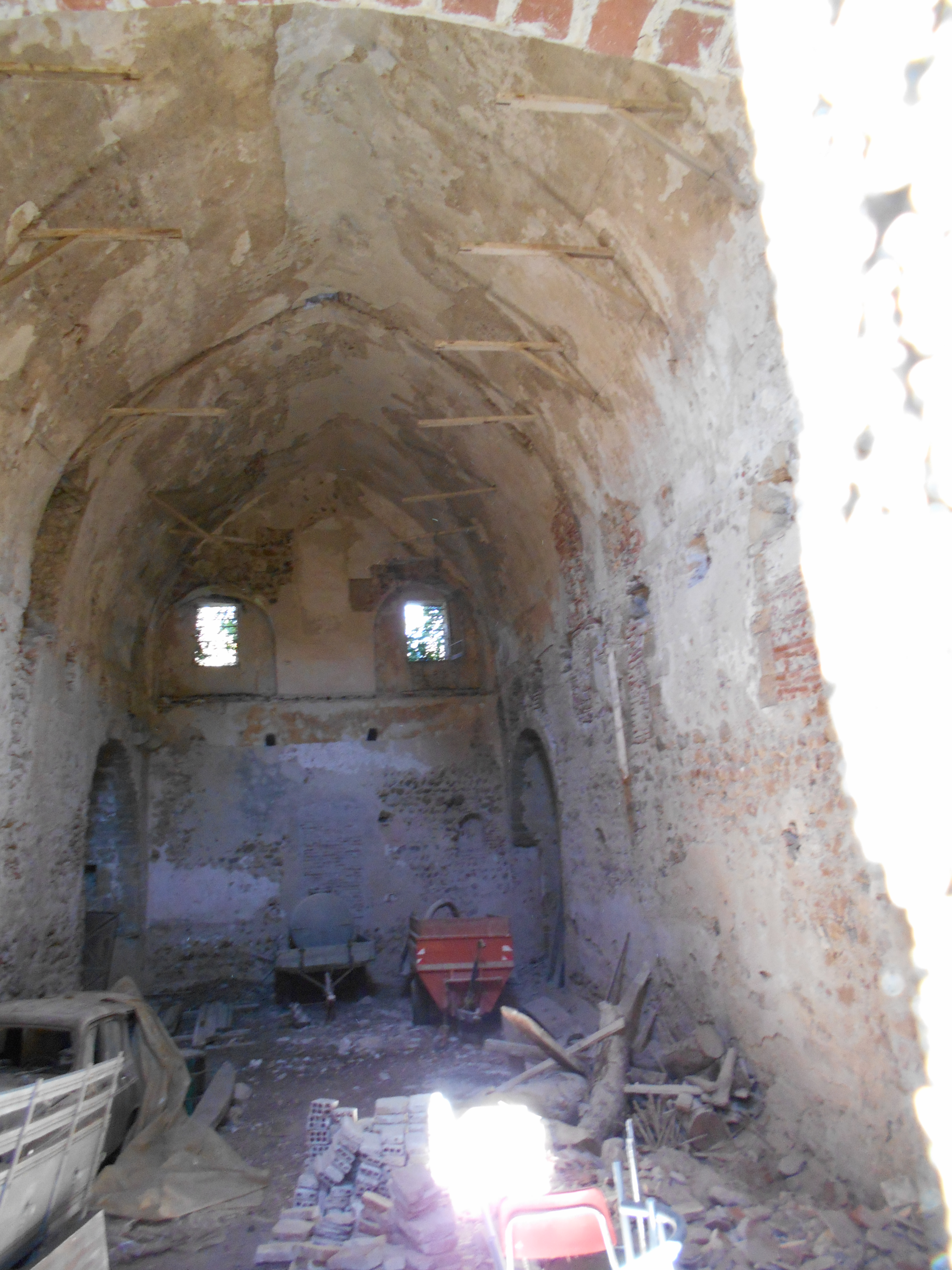 Santa Maria del Masdéu 2